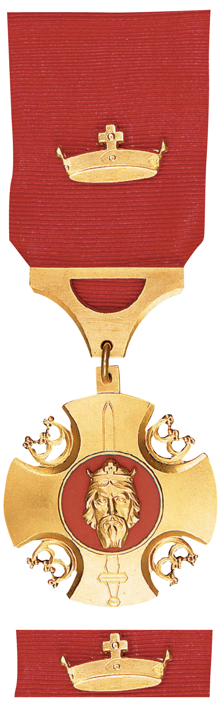 Pribinov kríž 1. triedy Dekorácie I. triedy vyznamenania tvorí: kríž razený zo striebra, pozlátený s prevlečnou stuhou, stužka a rozeta. Kríž je rupertského typu, má priemer 41 mm. Na lícnej strane kríža je uprostred červený smaltovaný medailón s plastickým strieborným reliéfom kniežaťa Pribinu. Prievlečná stuha je hodvábna, 40 mm široká, purpurovej farby v strede s miniatúrnou korunkou razenou zo striebra, ktorá je pozlátená. Stužka je hodvábna, purpurovej farby, dlhá 18 mm, široká 10 mm. V strede stužky je miniatúrna strieborná, pozlátená korunka so šírkou 12 mm a výškou 8 mm.